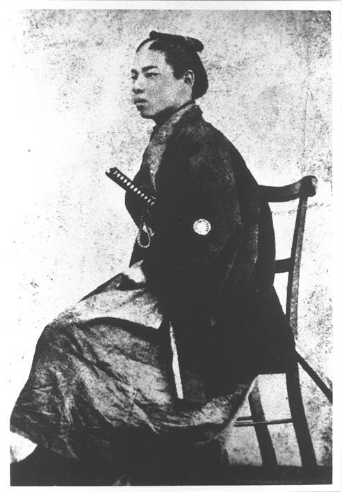 馬場辰猪、土佐藩士。慶應義塾出身。自由民権思想家。